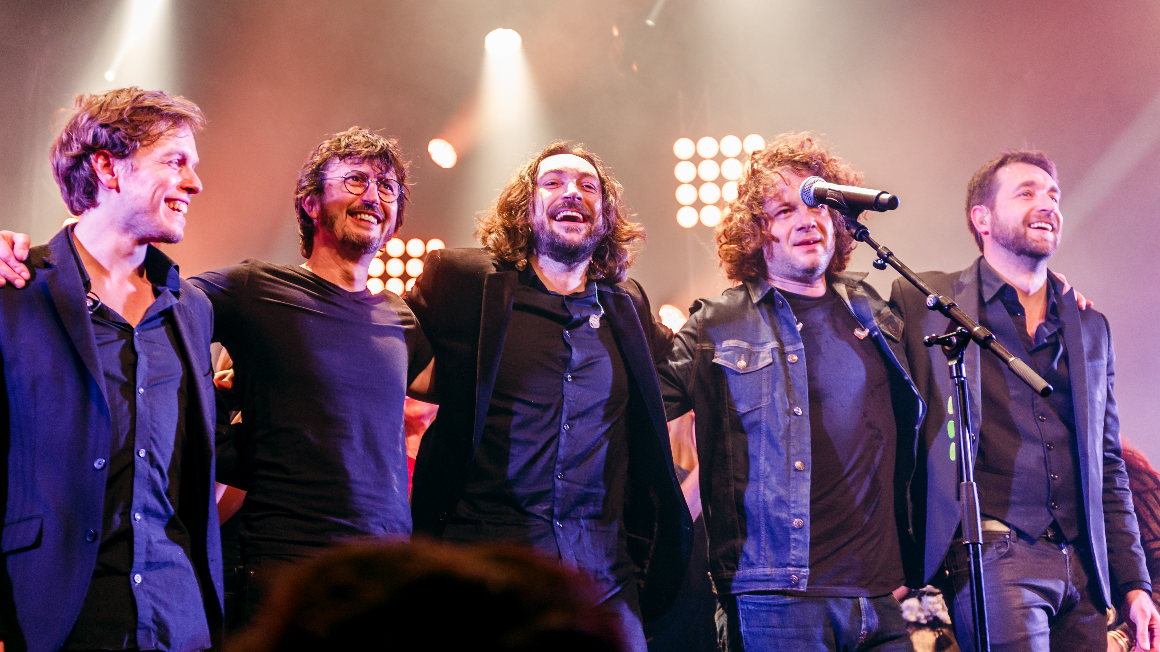 Premier concert du groupe Matmatah suite à sa reformation en 2016 à l'occasion de l'émission L'Avant-Scène tournée à l'Espace Avel Vor de Plougastel le 16 février 2017.